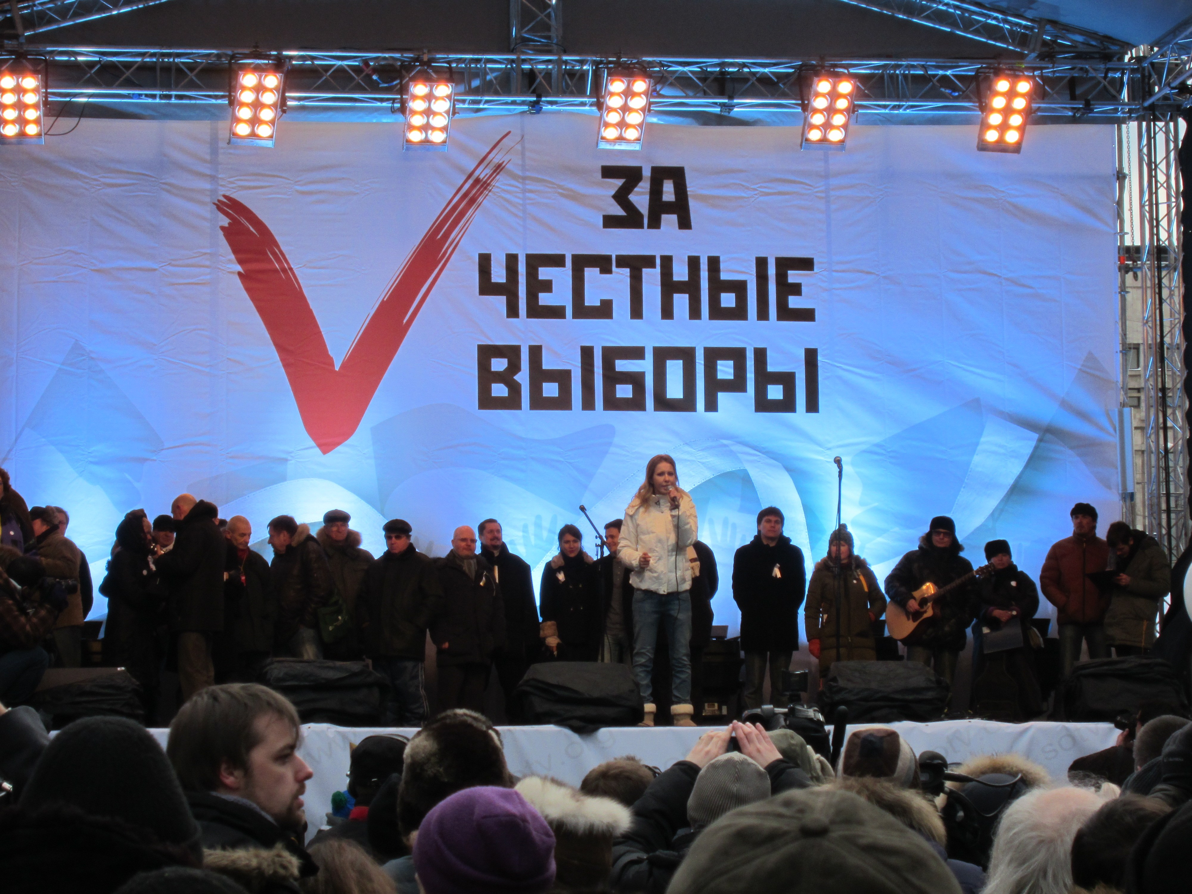 Митинг 24 декабря на проспекте Сахарова; выступление Ксении Собчак с трибуны митинга